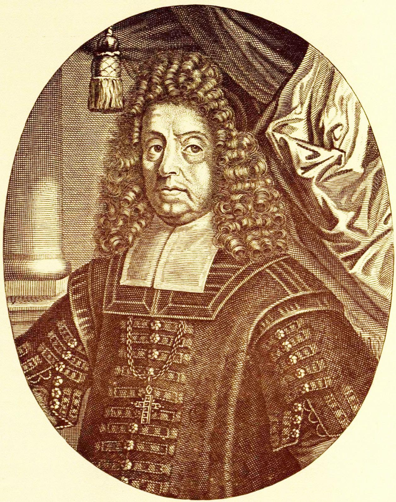 Jobst Edmund von Brabeck, Bischof von Hildesheim 1688-1702